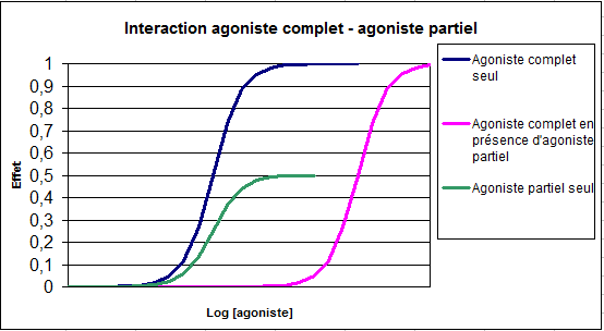 Schéma de l'action des agonistes d'un recepteur